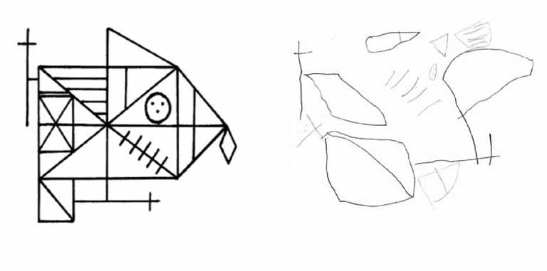 Figura utilizada en el diagnóstico de TANV. Los sujetos que padecen el trastorno presentan serias dificultades en copiar la figura tras tratar de memorizarla.